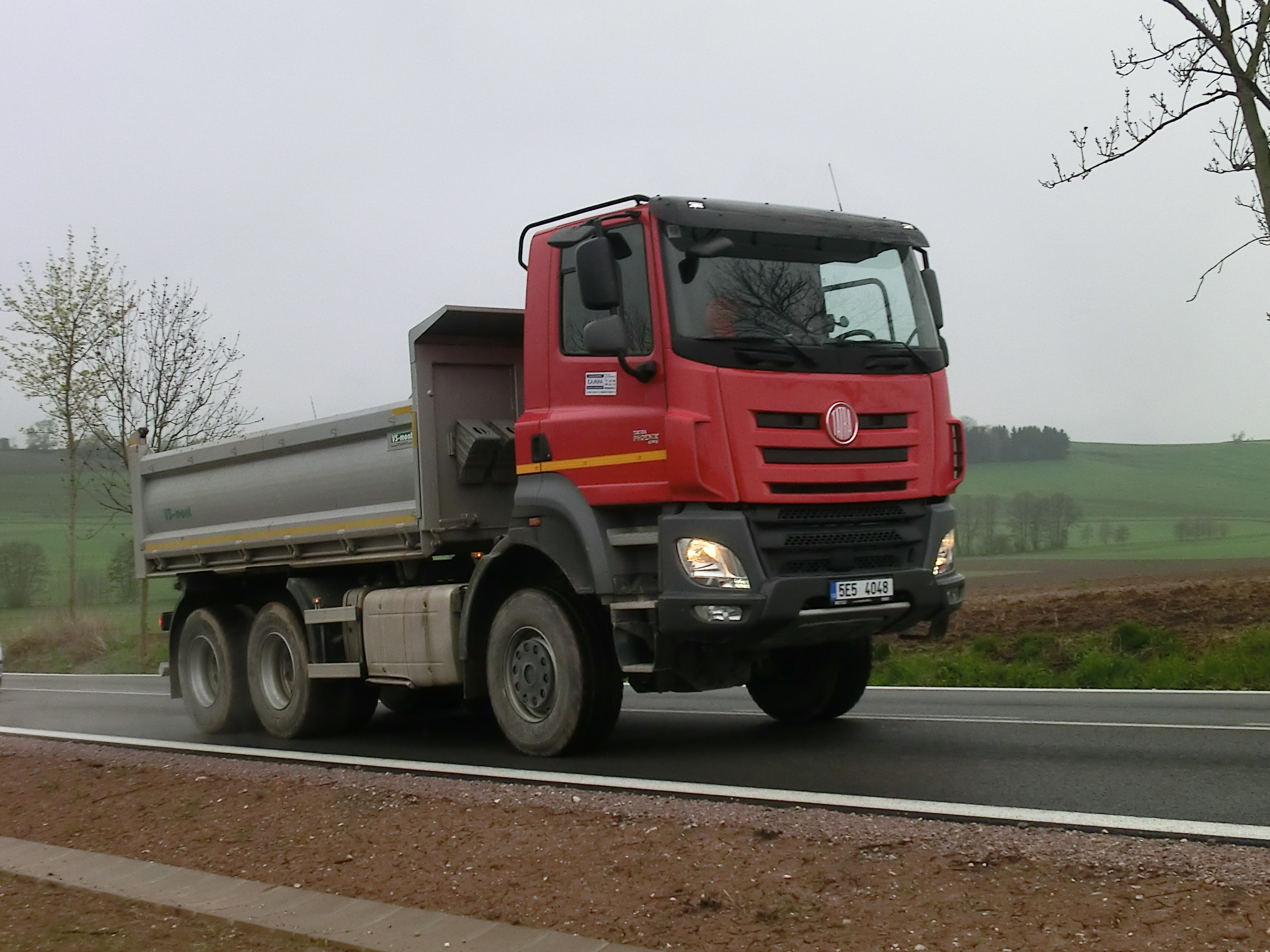 Sklápěč Tatra 158 Phoenix (po faceliftu 2015) Euro 6 na zrekonstruované silnici mezi Dolní Brannou a Vrchlabím.